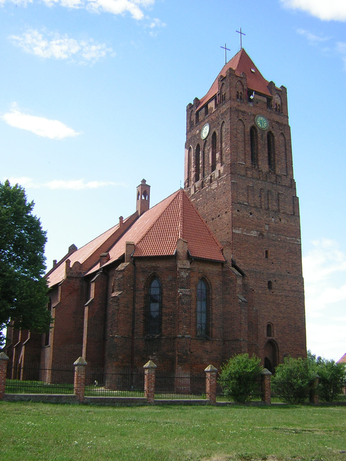 Prabuty, ul. Barczewskiego - Konkatedra p.w. św. Wojciecha (dec. ruina), 1 poł. XIV, po 1988